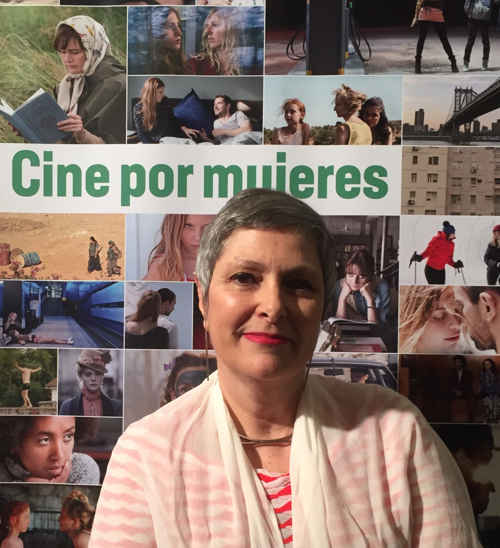 portrait